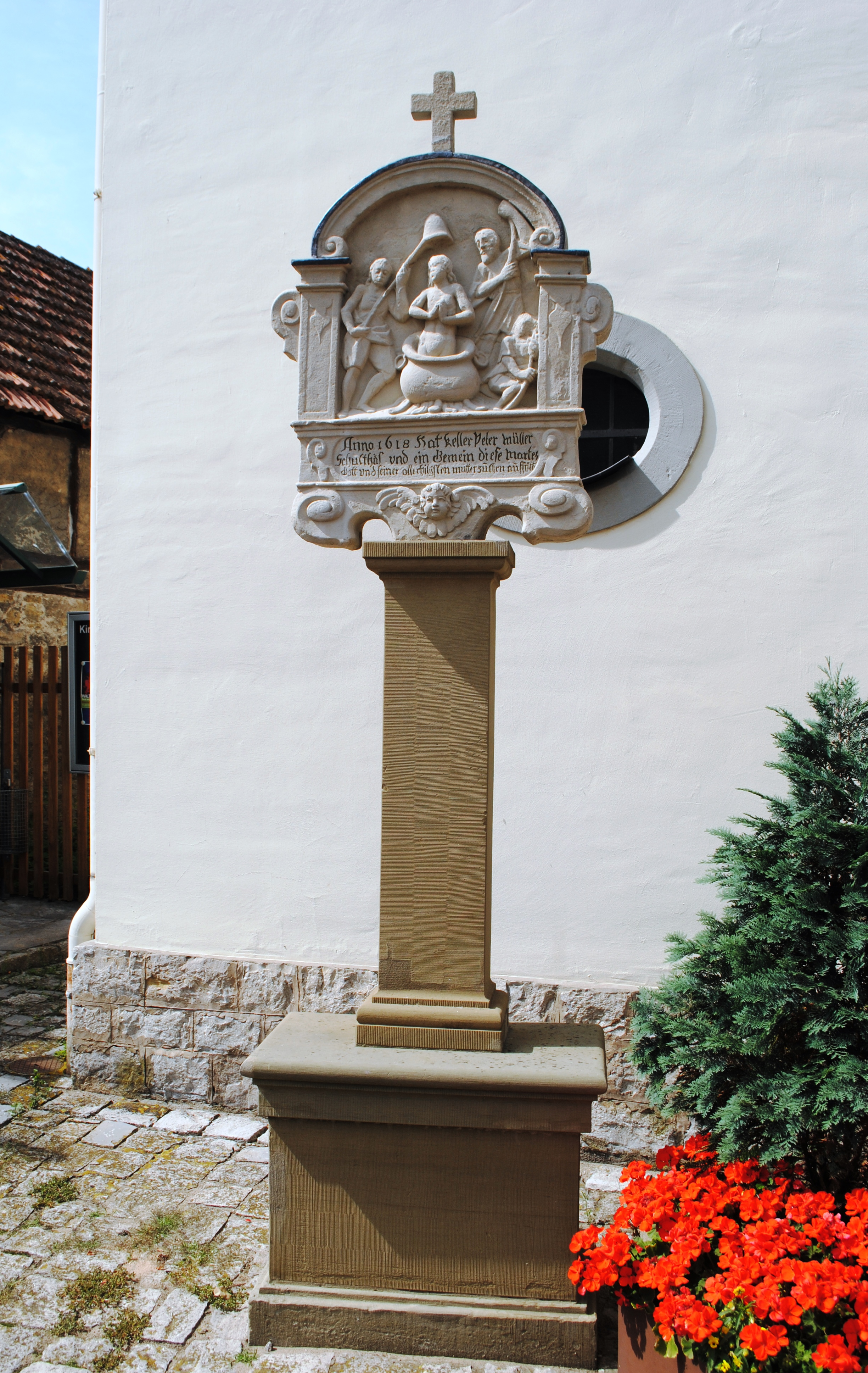 Bildstock, Hauptstraße, Schwarzach am Main-Hörblach